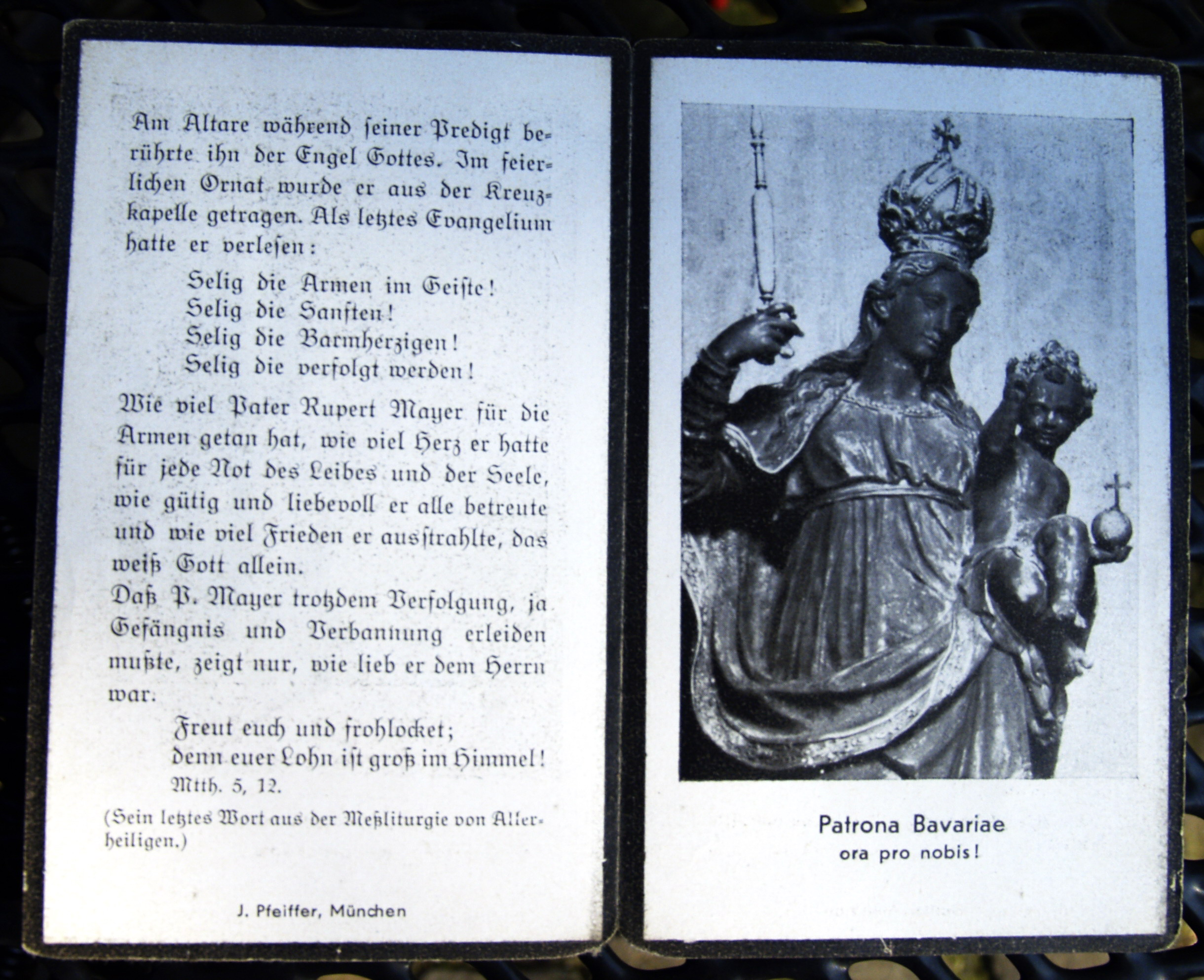 Der bei der Beerdigung von Pater Mayer ausgegebener Totenzettel